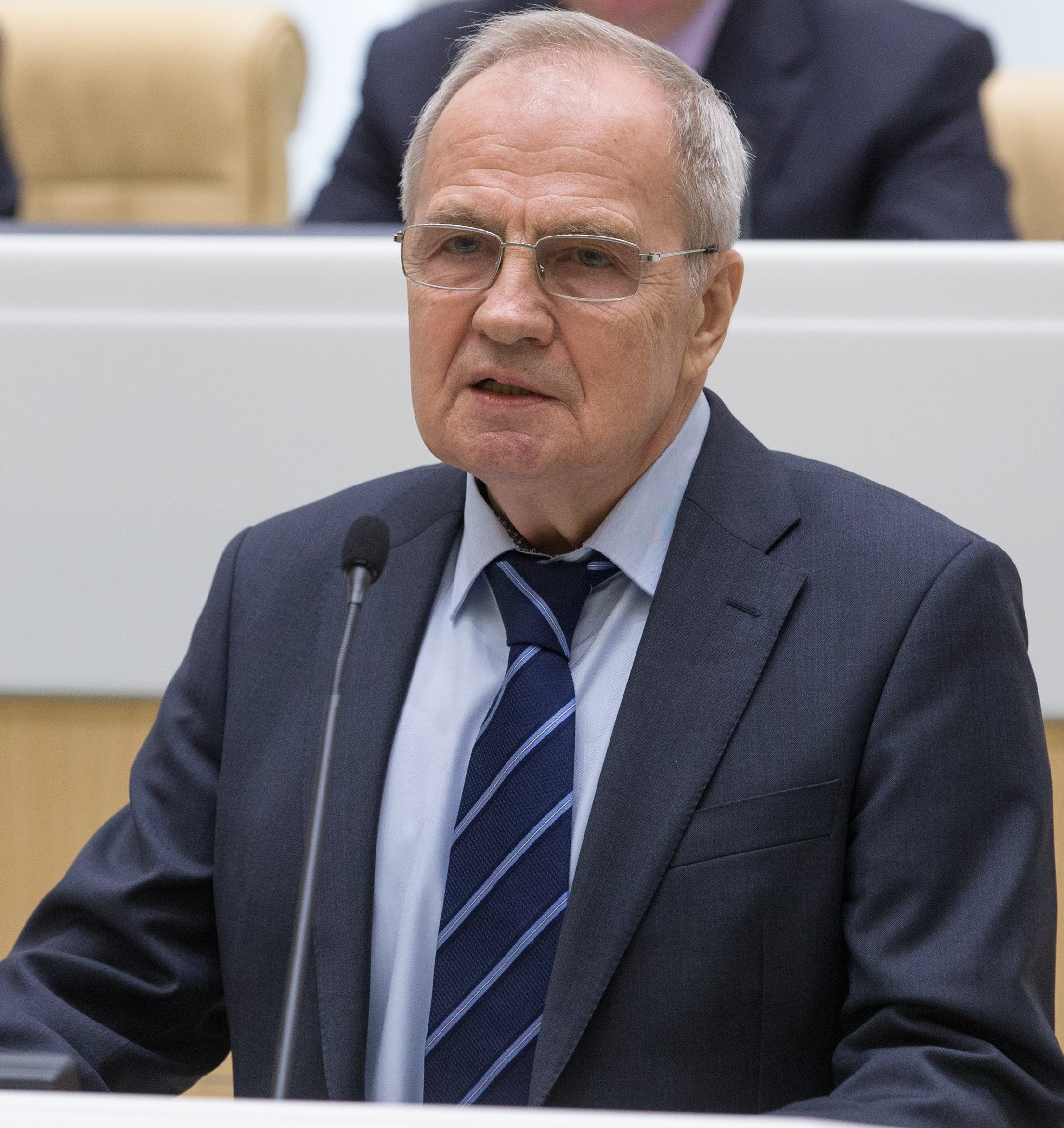 Валерий Дмитриевич Зорькин (род. 1943) — российский судья. Председатель Конституционного Суда Российской Федерации.